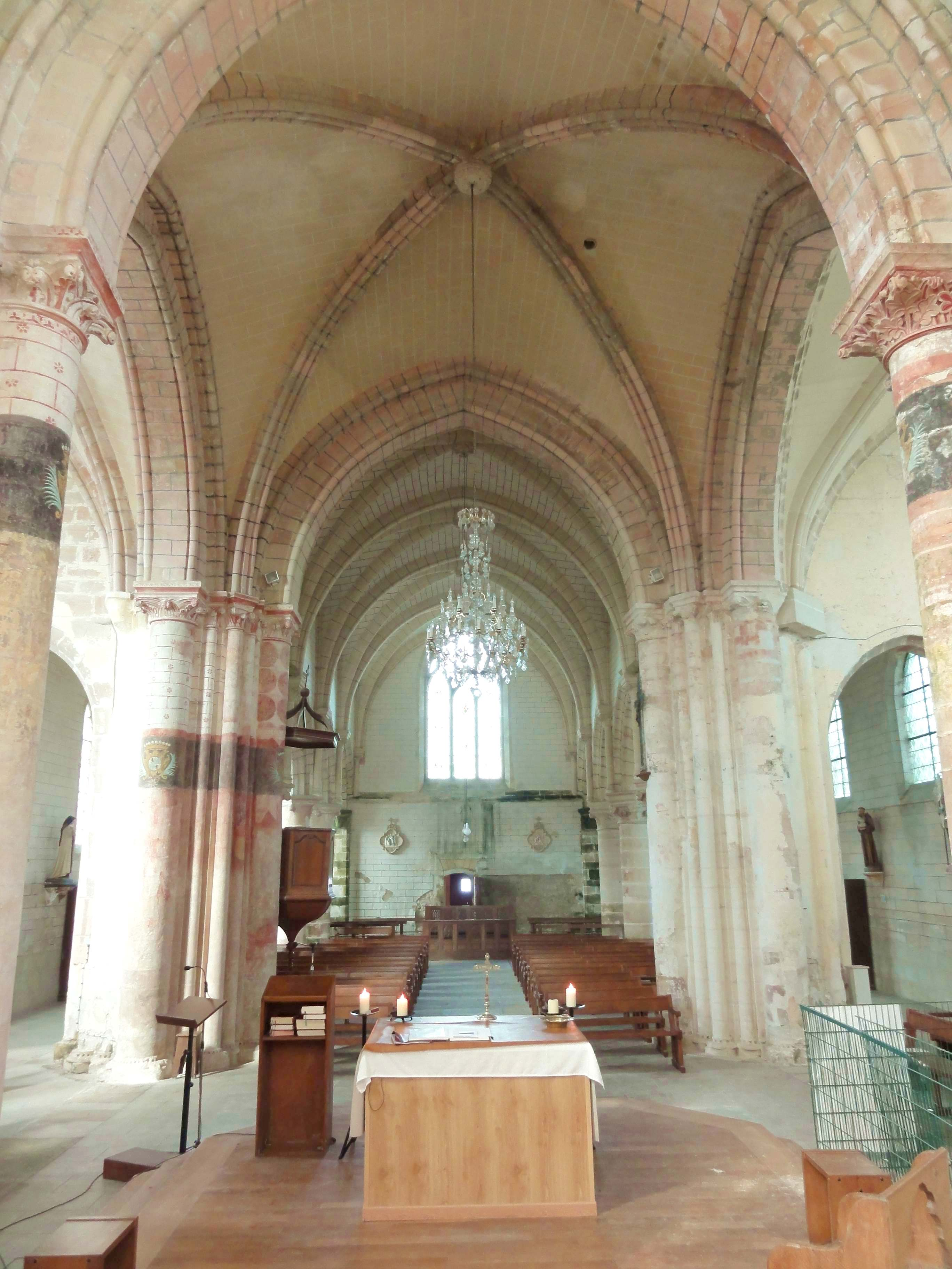 Intérieur de l'église (voir titre).